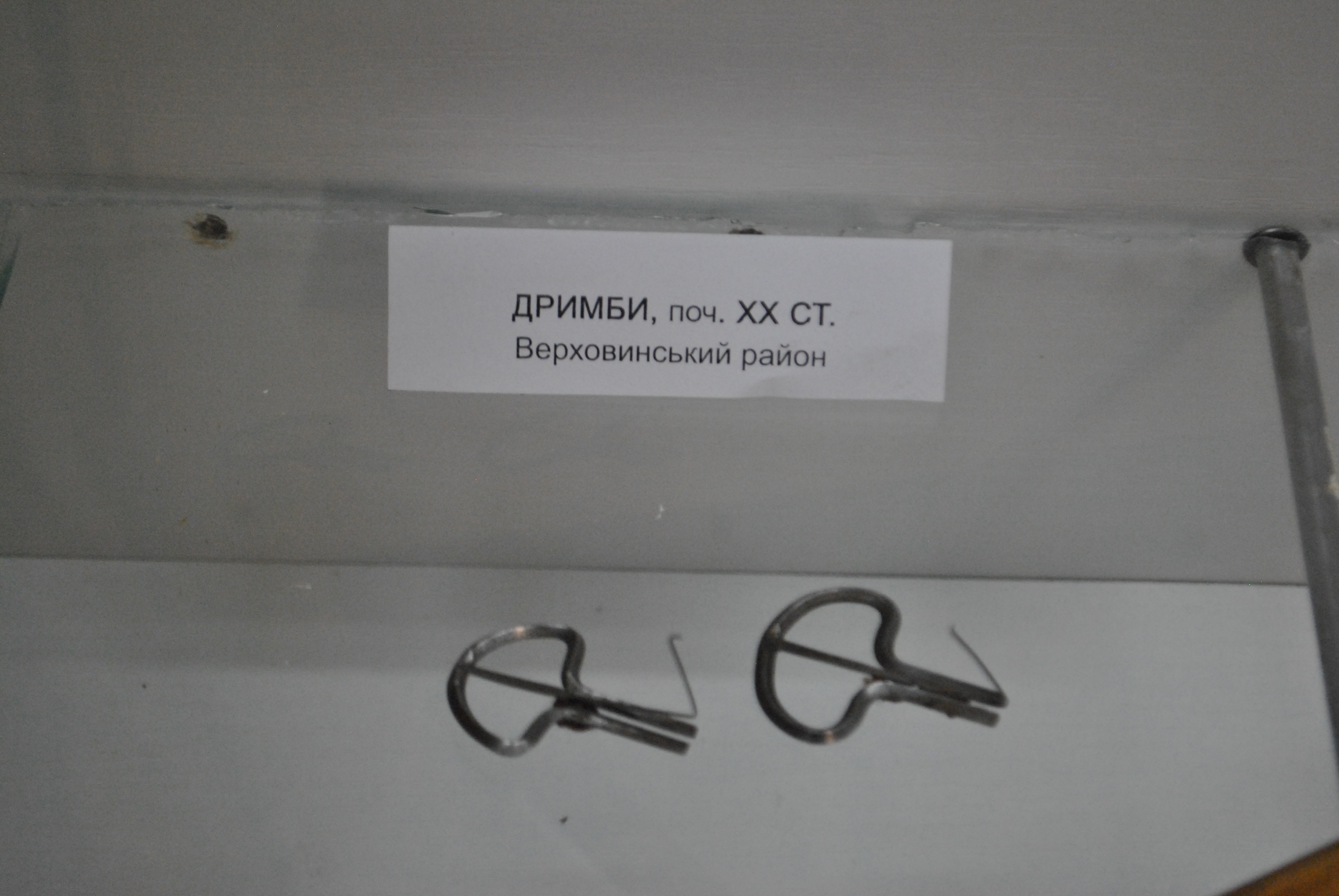 Дримби поч. ХХ ст